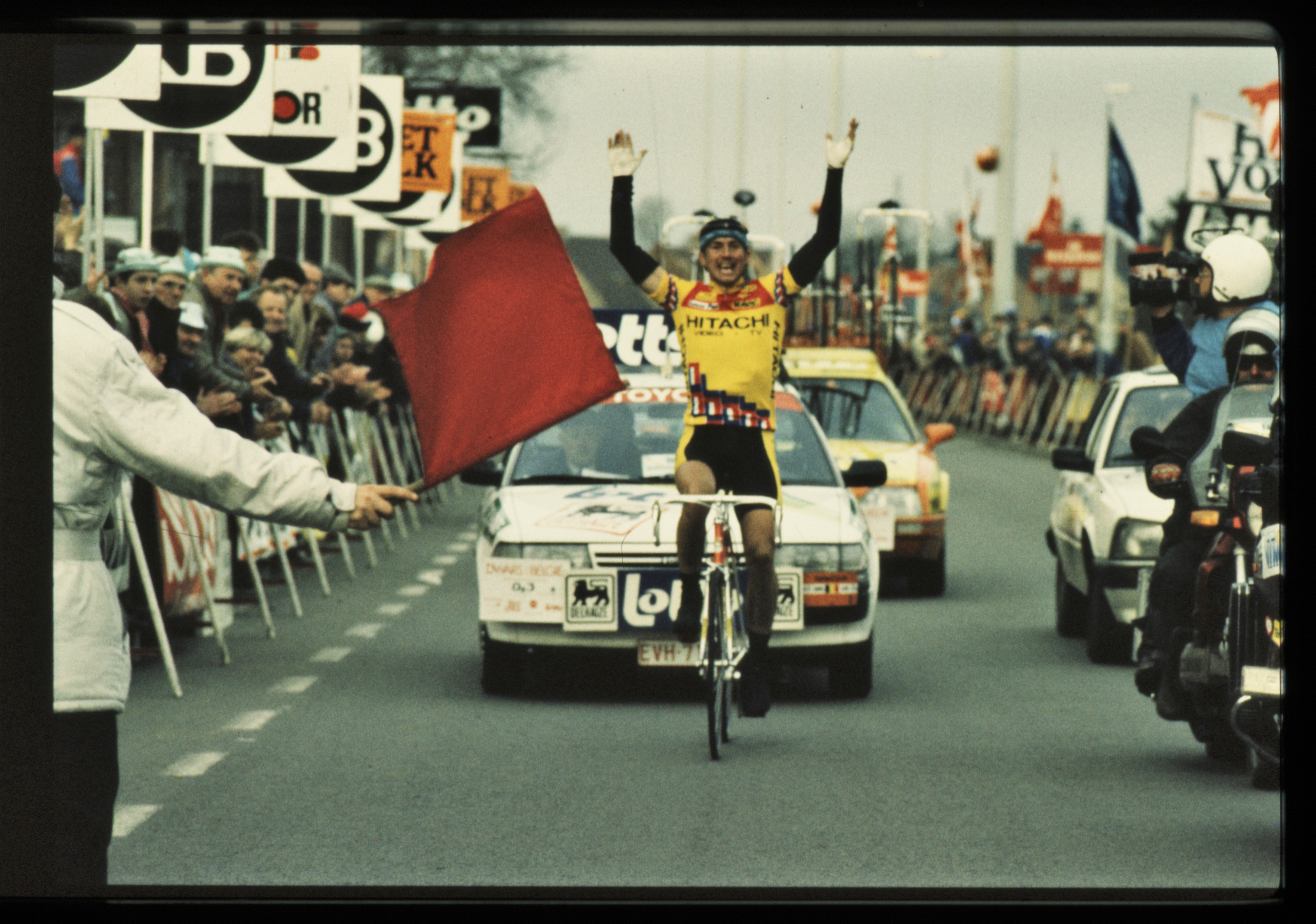 Dirk Dewolf komt al juichend over de streep aan de Zuiderlaan in Dwars door België ‘89. De keuze voor de nieuwe aankomst is te wijten aan het BK, dat in Waregem wordt georganiseerd. In de wedstrijdbrochure van dit BK wordt de aankomstzone beschreven: “De Zuiderlaan is een dubbele asfaltweg waarvan de twee rijvakken gescheiden zijn door een middenberm. De breedte van elk rijvak bedraagt acht meter. Op het rechterrijvak ligt de aankomstlijn, op het linkervak en op de rechterberm staan de tribunes en podiums opgesteld. Het linkervak zal in de laatste ronde eveneens benut worden als afleidingszone van de volgwagens.”